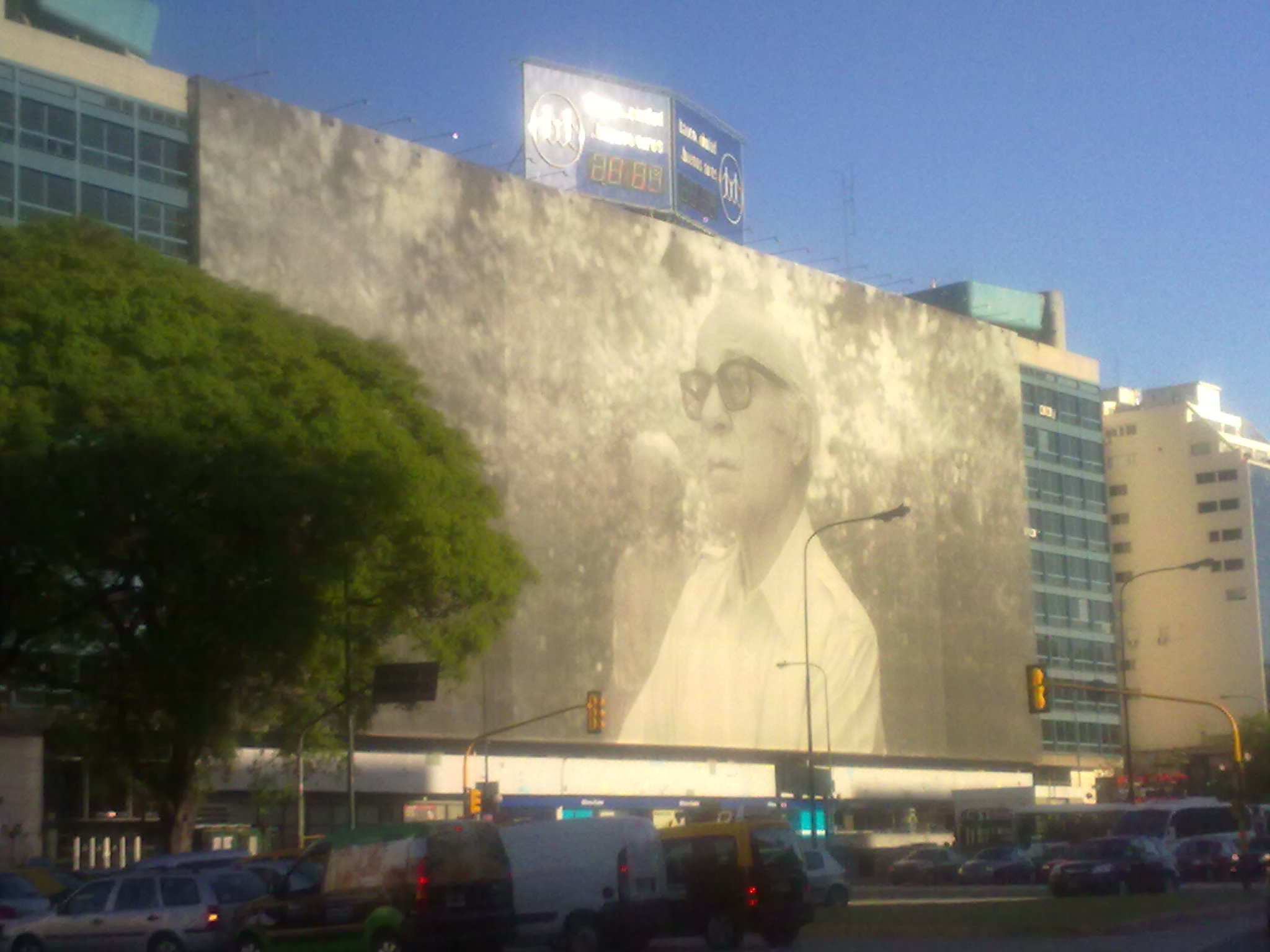 Una gigantografía en el edificio del Plata muestra a Ernesto Sábato. Buenos Aires, Argentina.